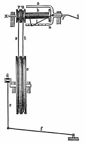 Das Funktionsprinzip des Spinnrades aus Meyer's Conversationslexikon von 1888